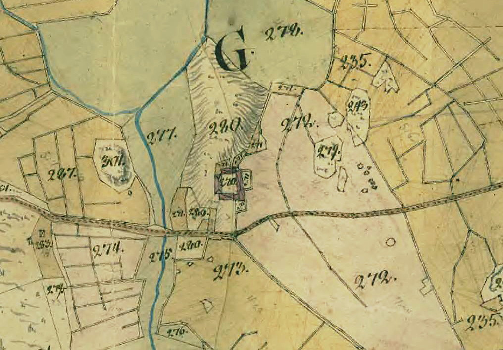 Del av karta över Sollentunaholm och Wiby visande Överby gård uppmätt 1812 och 1813